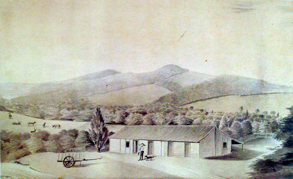 Herrmann Wendroth: Típica propriedade rural da zona central da Província de São Pedro, 1852. Aquarela.